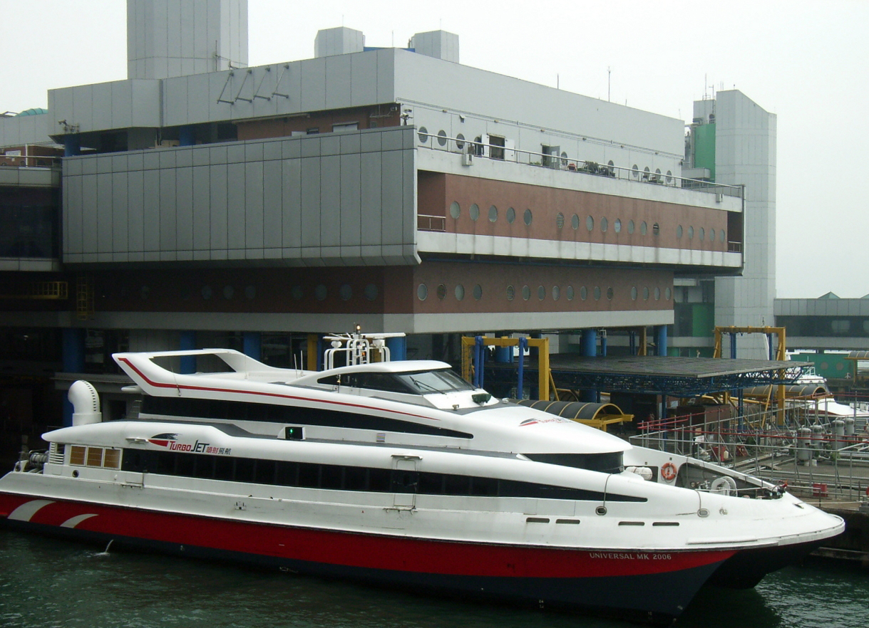 噴射飛航（Turbojet）是信德中旅船務管理有限公司的品牌。